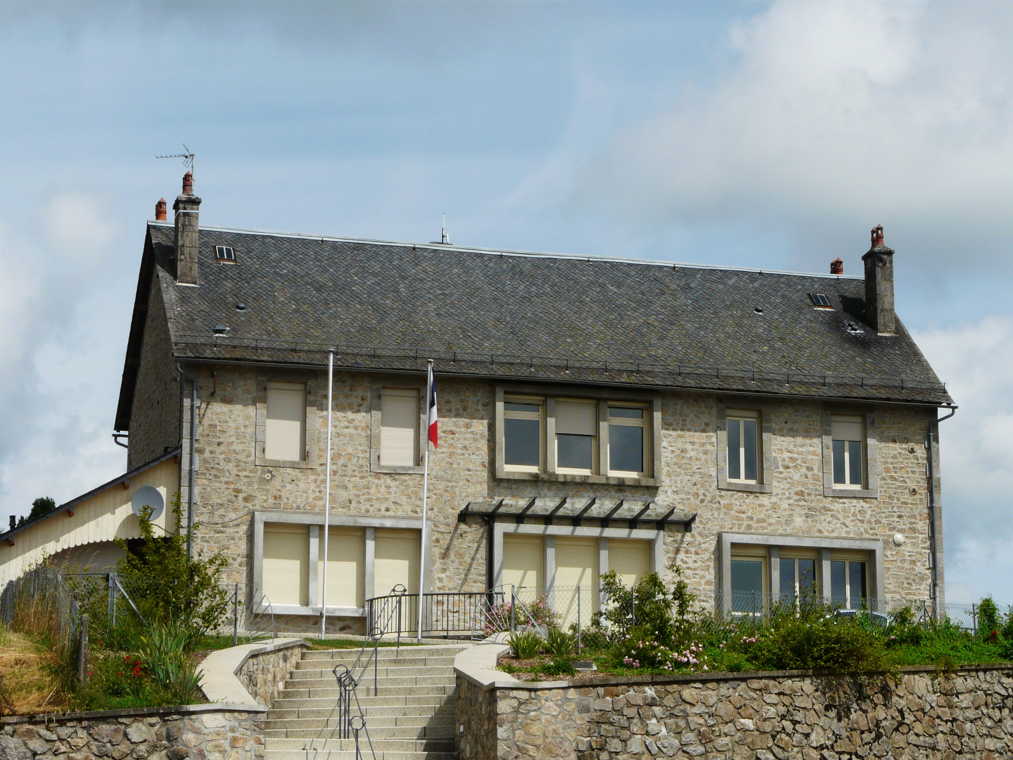 La mairie de Saint-Fréjoux, Corrèze, France.